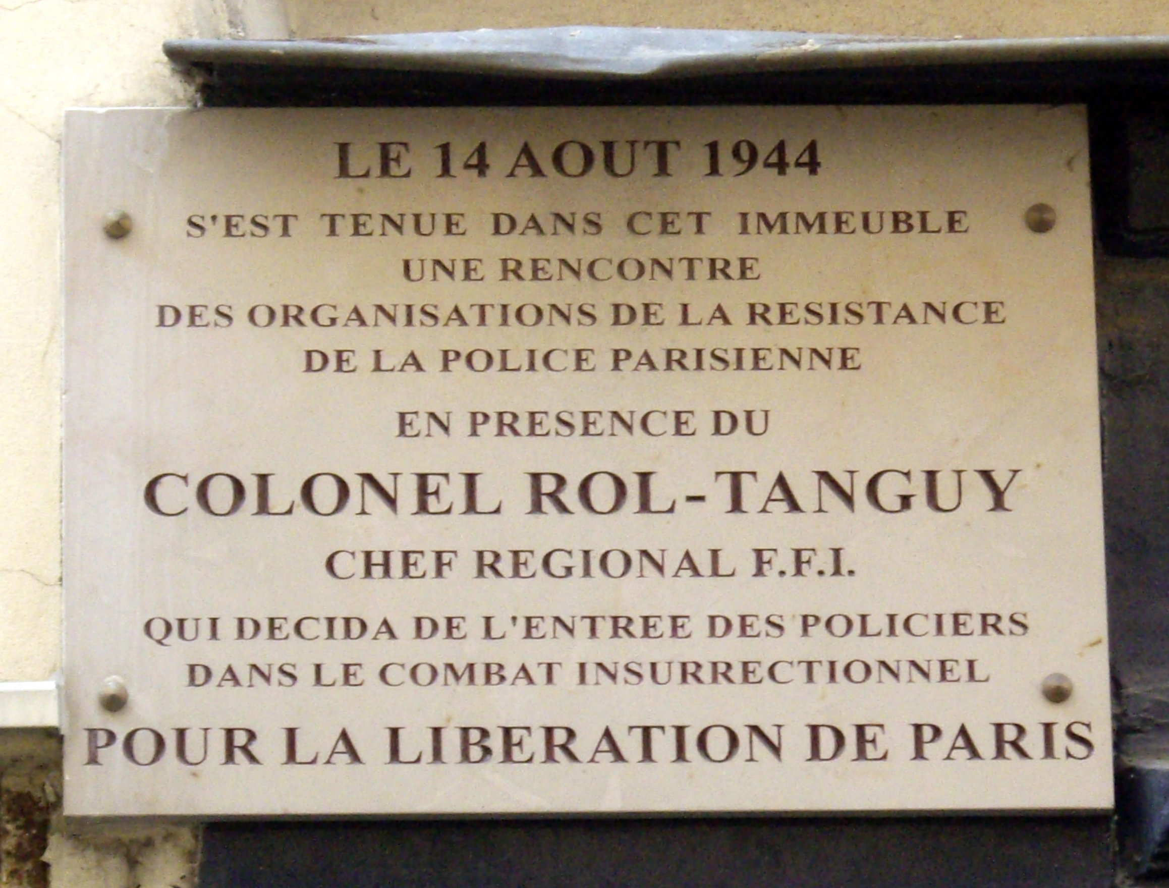 Plaque apposée au n° 48 de la rue Chapon, Paris 3e. « Le 14 août 1944 s'est tenue dans cet immeuble une rencontre des organisations de résistance de la police parisienne en présence du colonel Rol-Tanguy, chef régional FFI, qui décida de l'entrée des policiers dans le combat insurrectionnel pour la libération de Paris. »